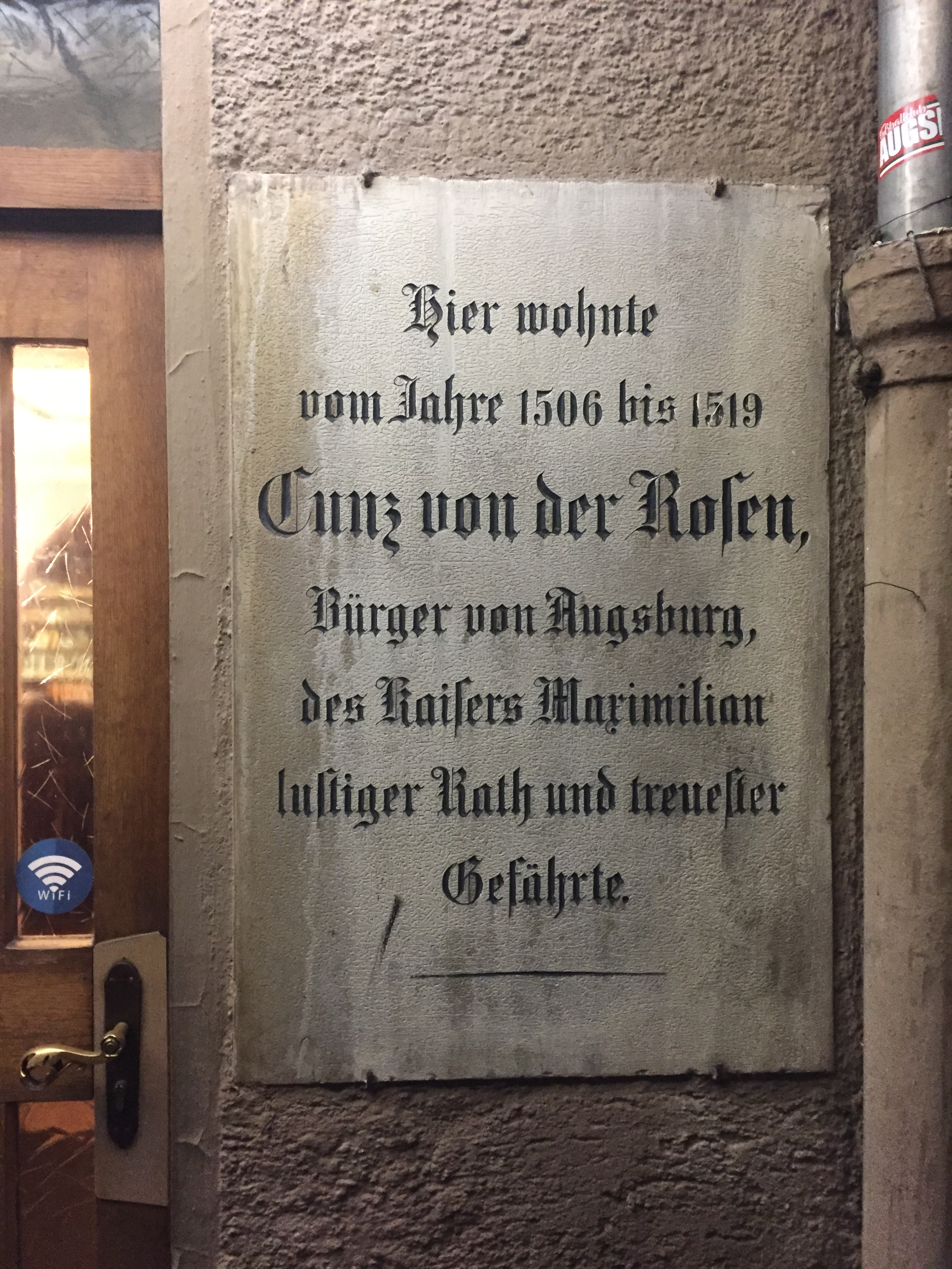 Inschrift am Wohnhaus von Cunz von der Rosen in Augsburg, Jesuitengasse 18 (heute: Maximiliansklause).